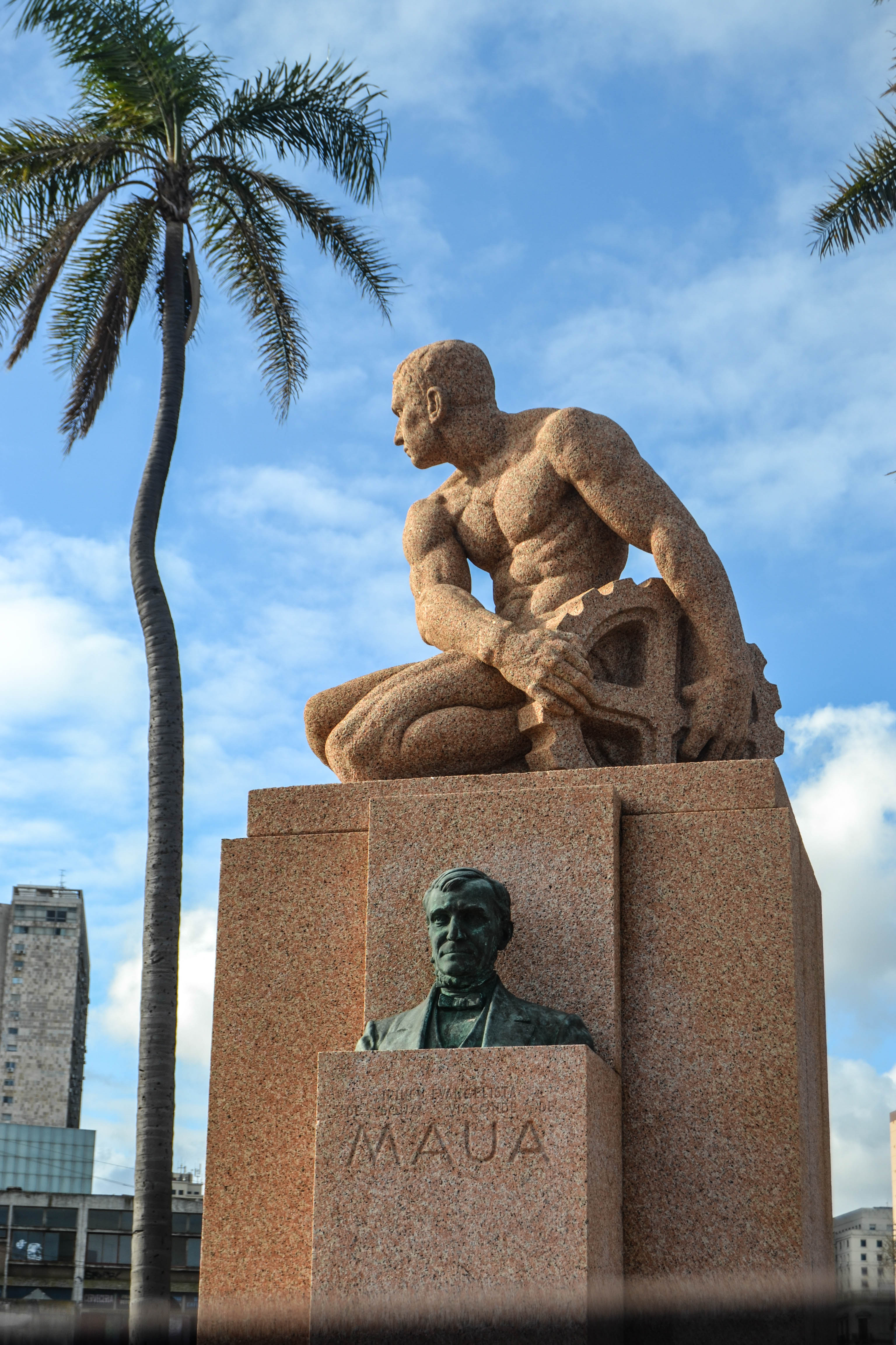 Vizconde de Mauá. Ubicada en el departamento de Montevideo